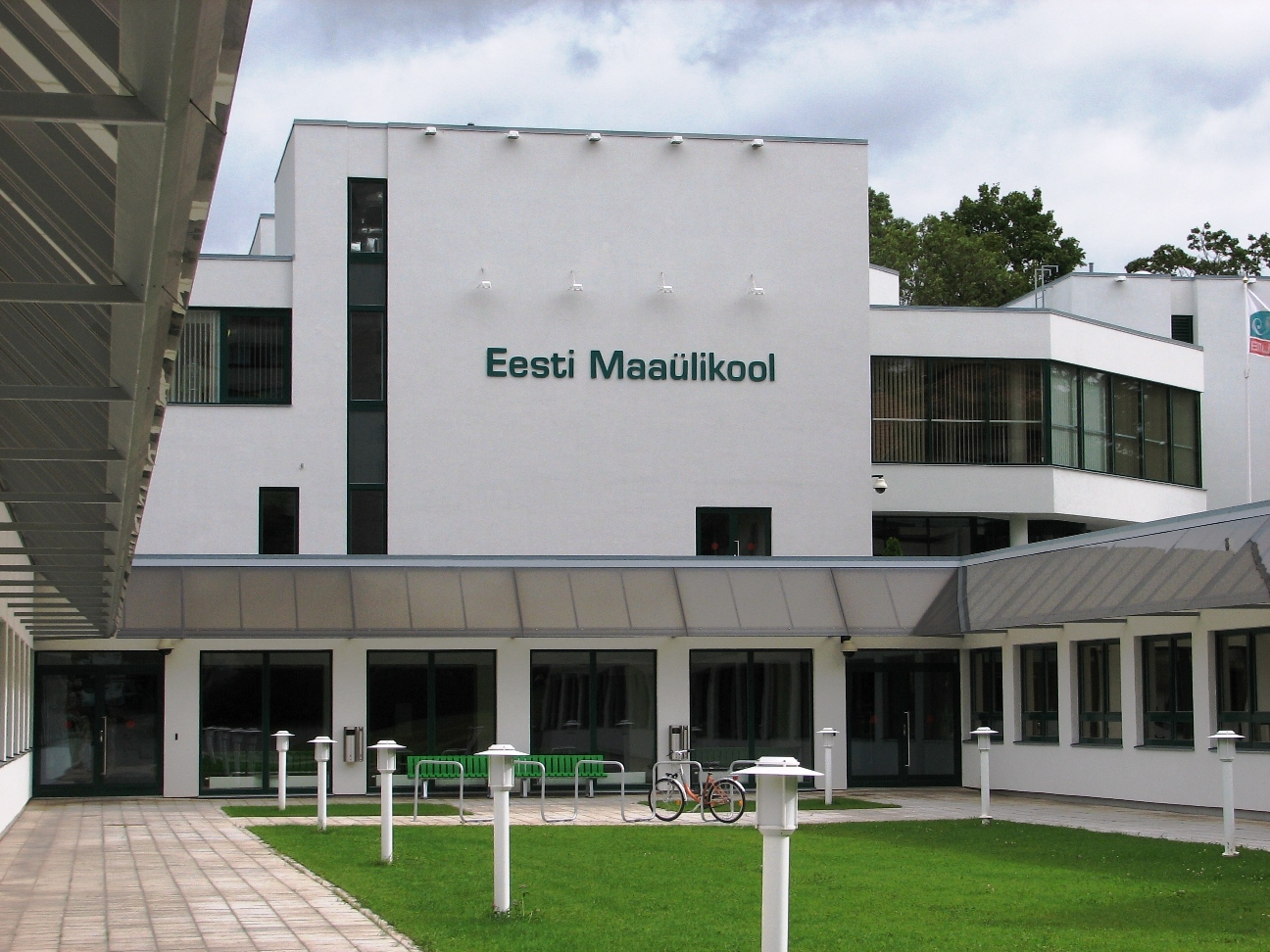 Eesti Maaülikooli peahoone